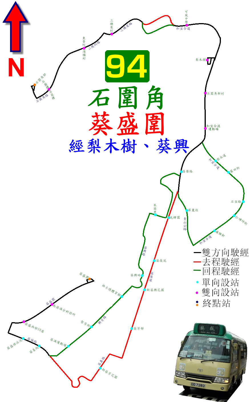 中文（香港）: 新界專線小巴94線的走線圖